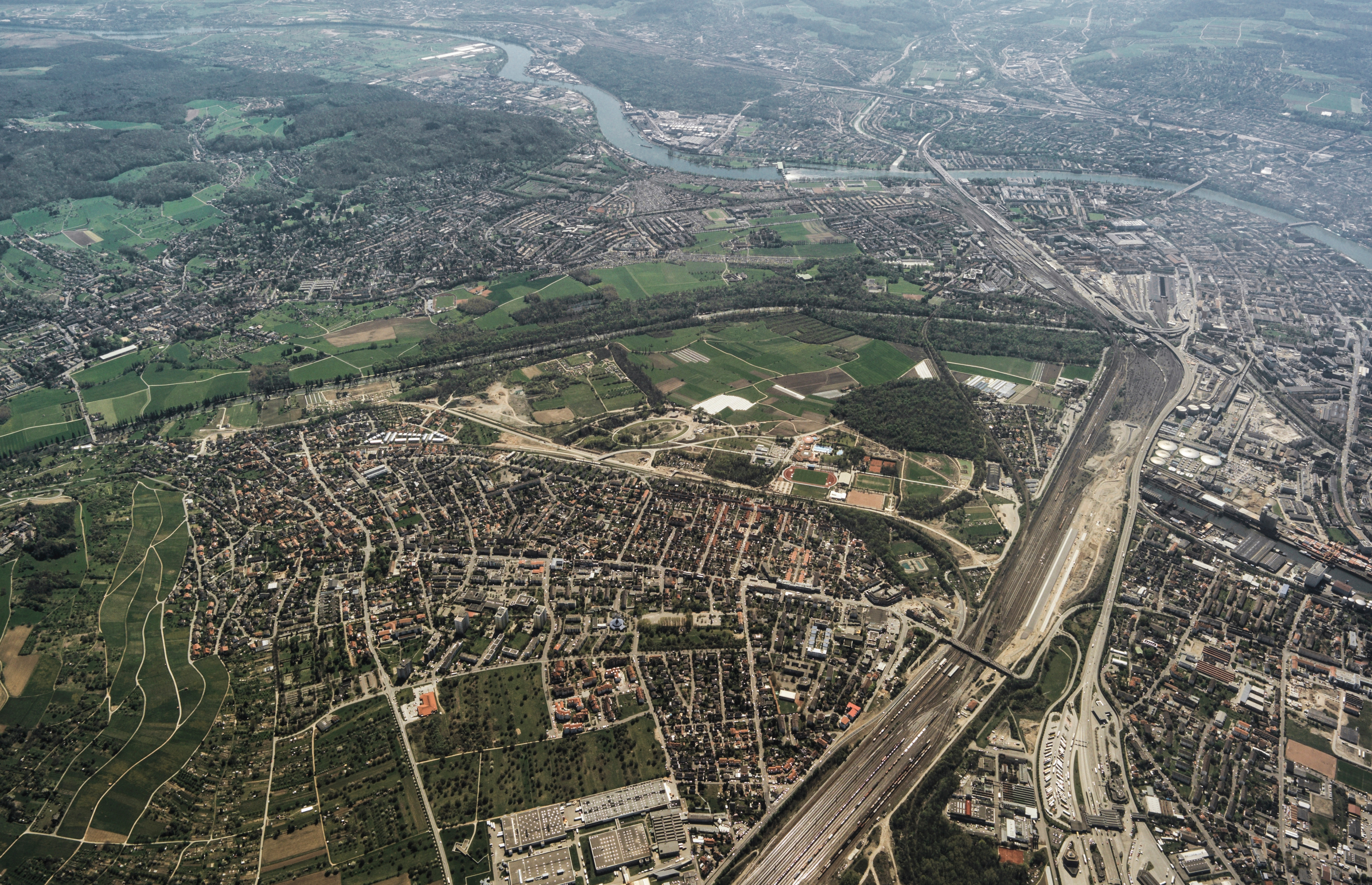 Luftbild von Norden: Weil am Rhein, im Hintergrund Basel und Rheinknie